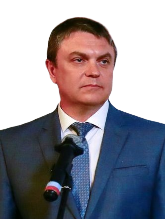 Леонид Иванович Пасечник (род. 15 марта 1970 года) — государственный и военный деятель непризнанной Луганской Народной Республики